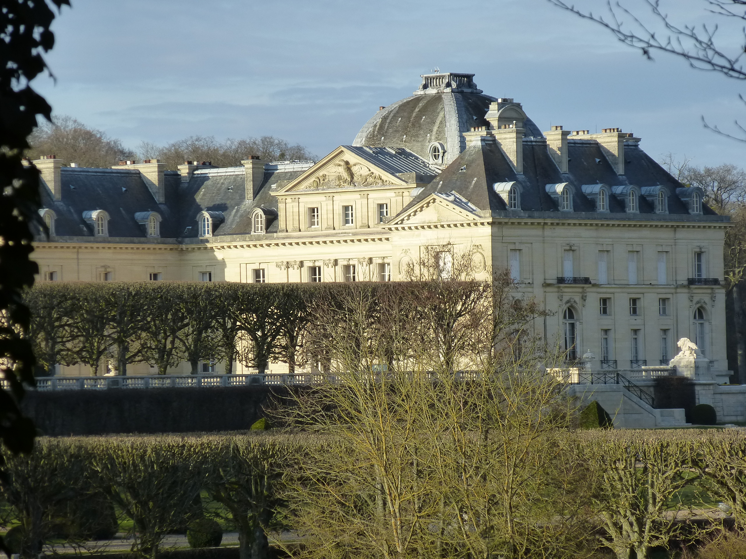 château de Voisins à Saint-Hilarion (Yvelines, région Île-de-France).